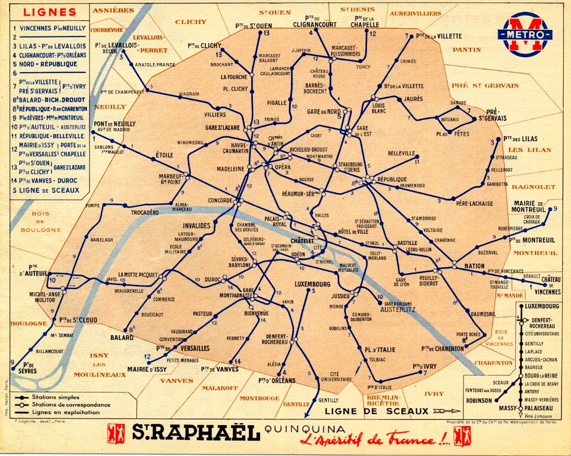 Métro parisien, état du réseau en 1940. Les lignes 2 et 6 ainsi que certaines stations ne sont pas représentées.